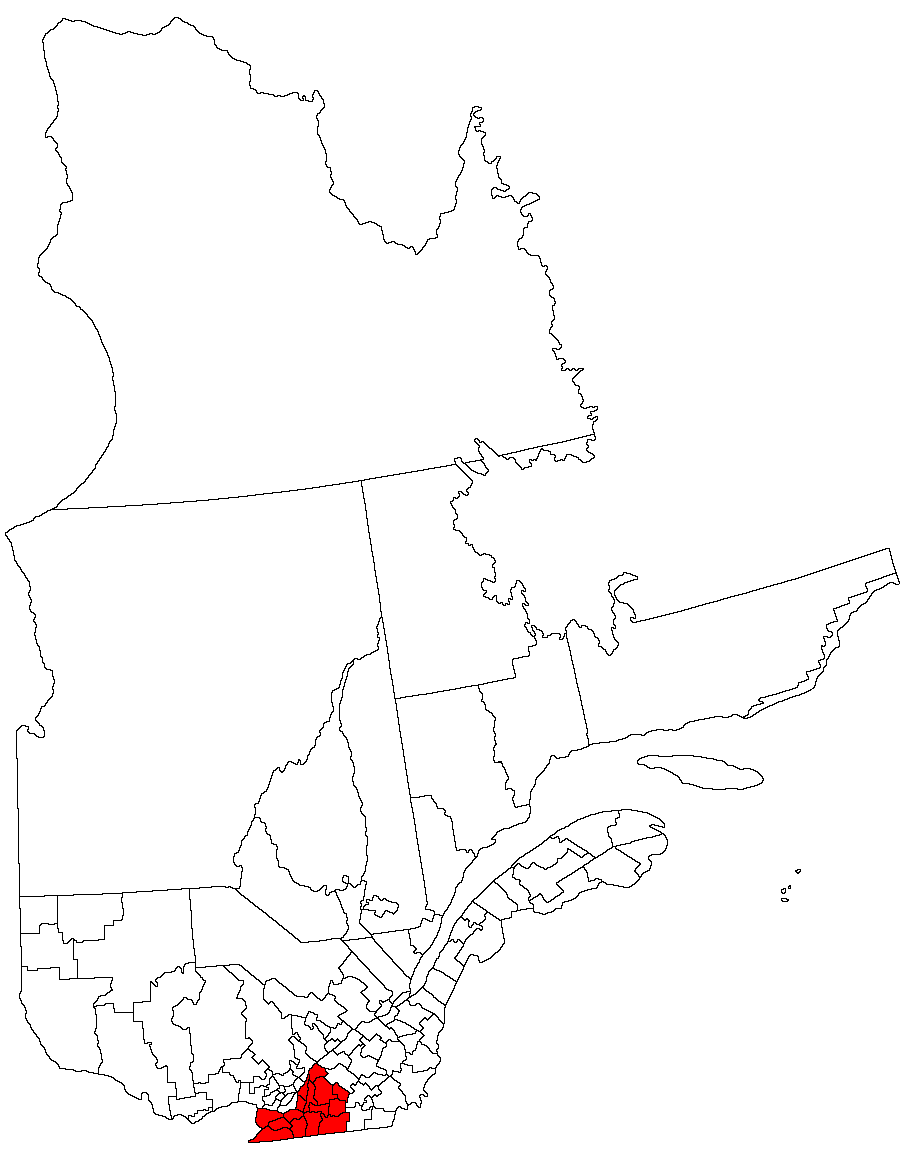 Montérégie region, Quebec